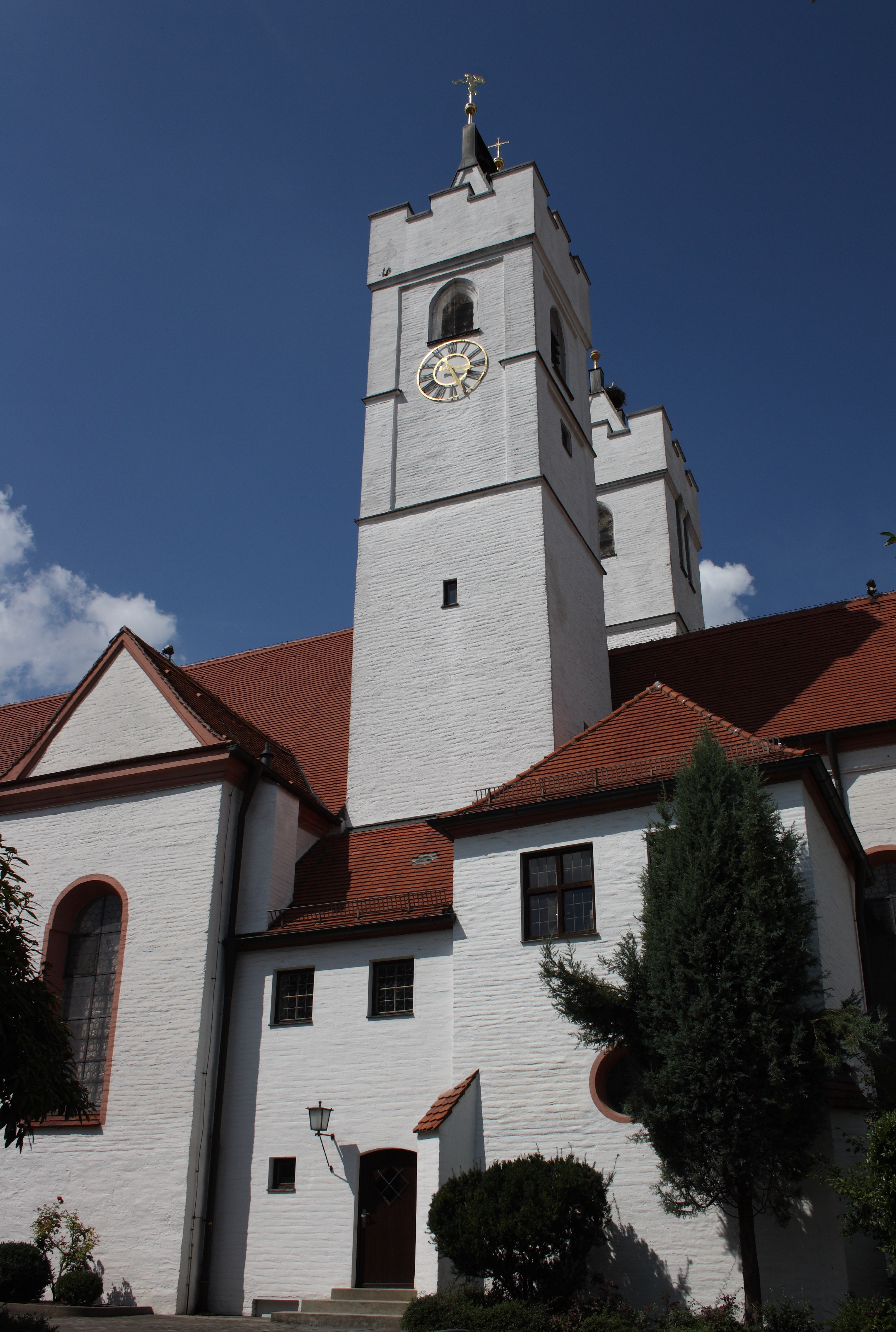 Katholische Pfarrkirche St. Martin in Wertingen im Landkreis Dillingen an der Donau (Bayern), um 1700 errichtet